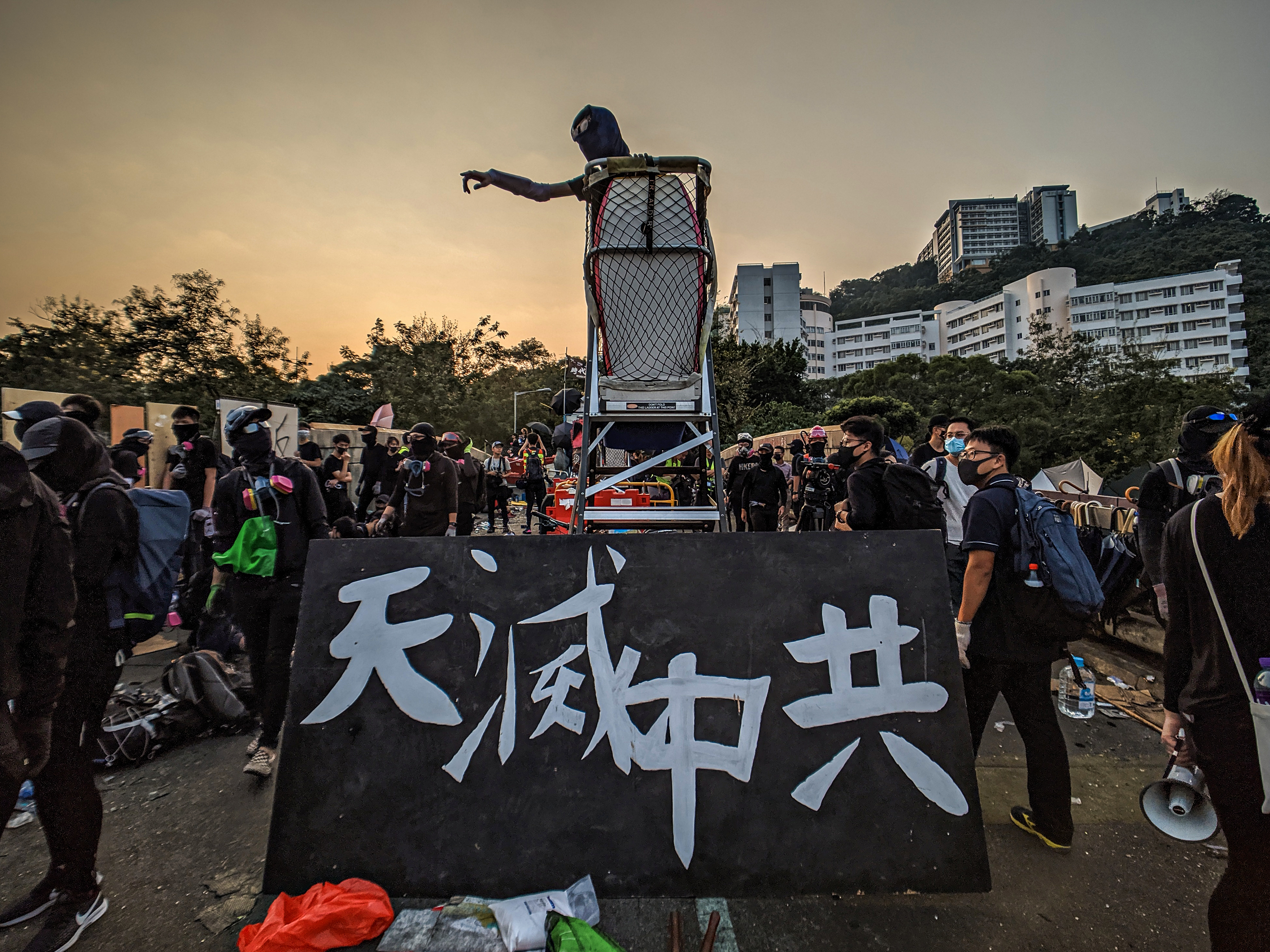 IMG_20191113_165735